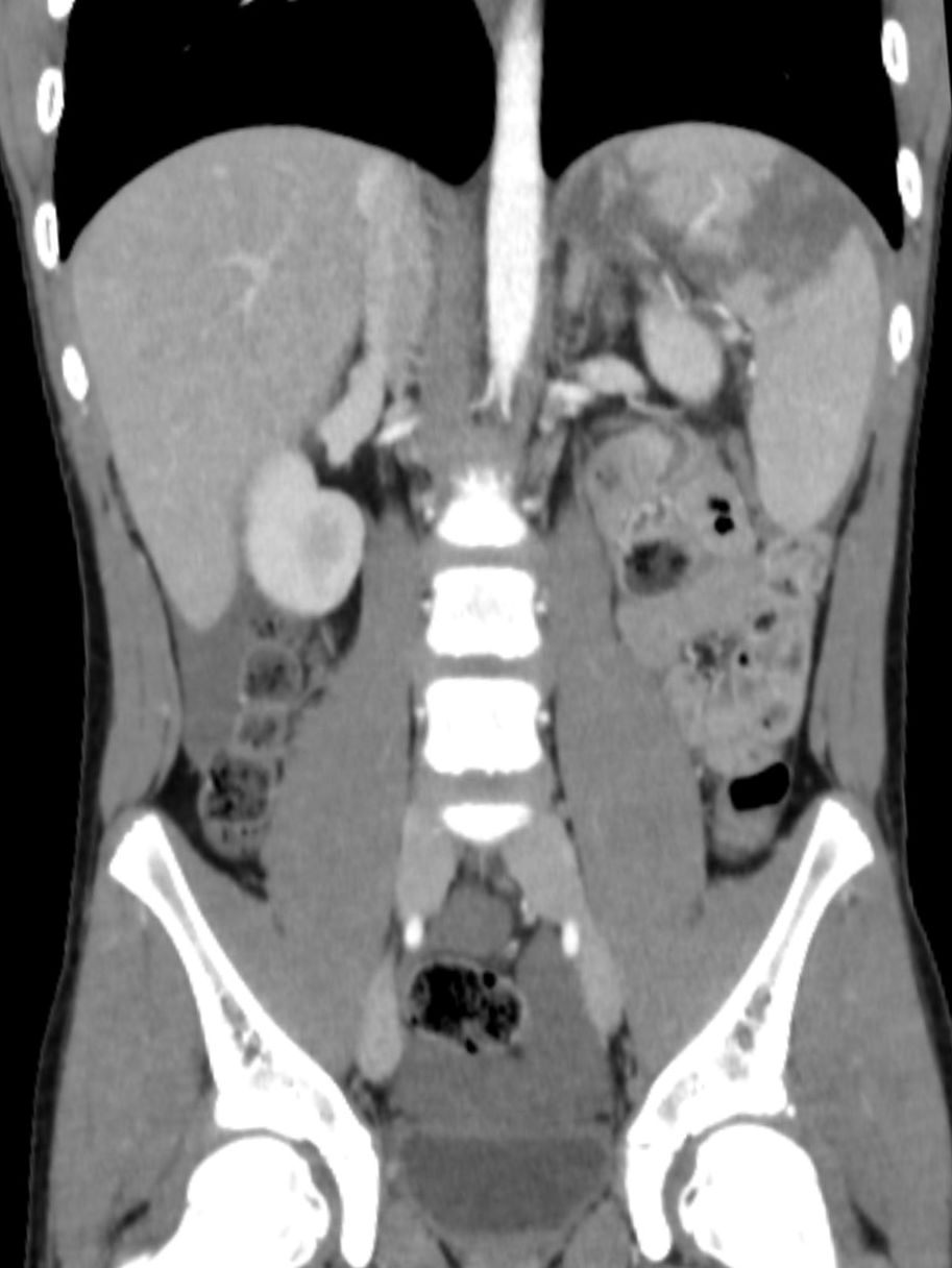 Akute Milzruptur in der Computertomographie, coronar reformartiert. Reichlich freie Flüssigkeit.